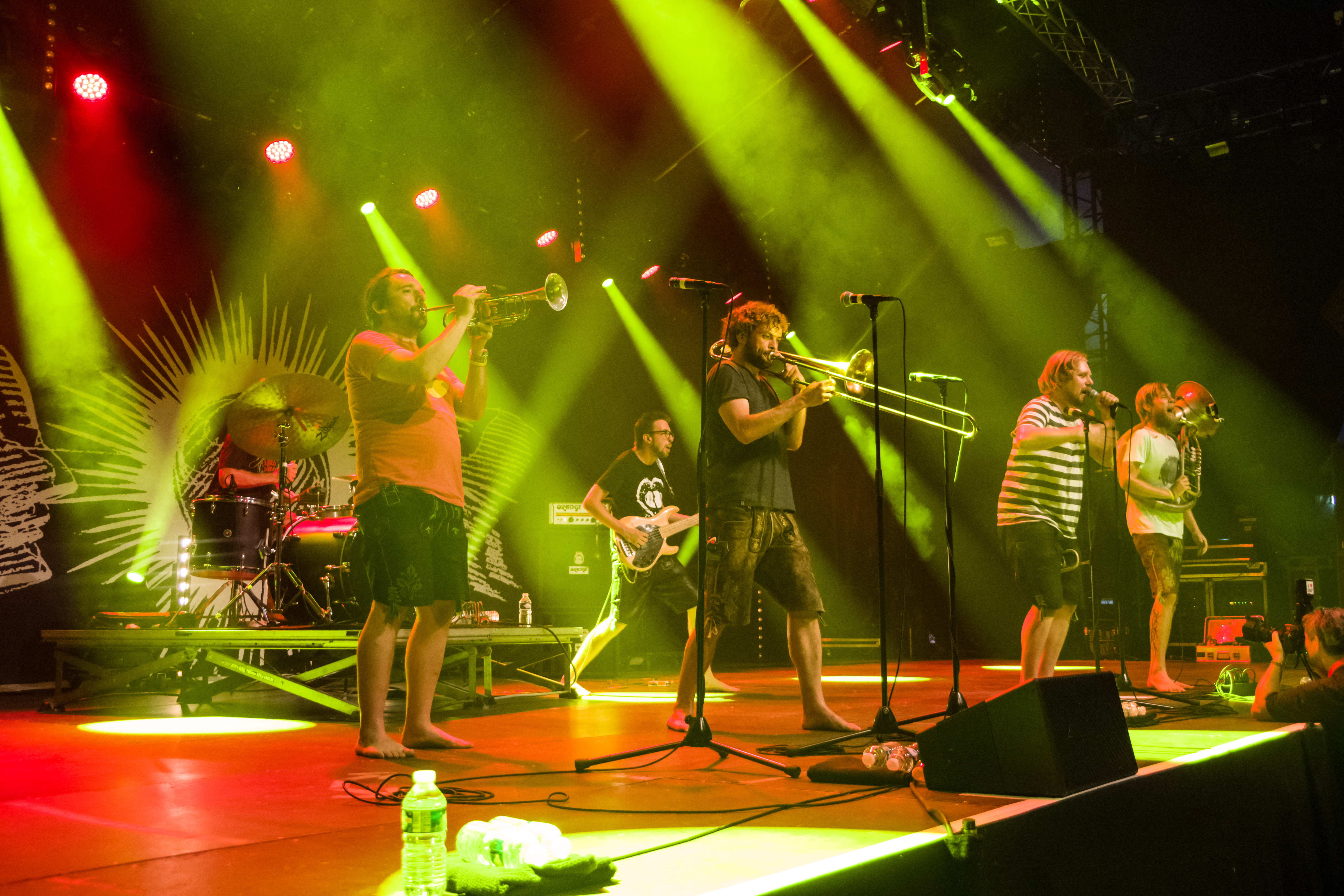 Das Zelt-Musik-Festival 2017 in Freiburg im Breisgau 08.07.2017 LaBrassBanda Trompete, Gesangː Stefan Dettl Tubaː Stefan Huber Posauneː Manuel Winbeck Trompeteː Jörg Hartl Schlagzeugː Manuel da Coll Bassː Mario Schönhofer